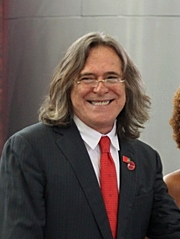 Ator brasileiro José de Abreu